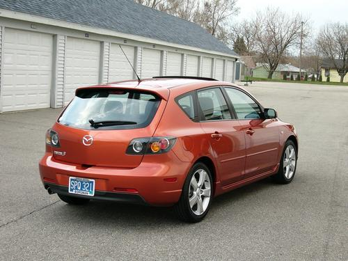 2004 Lava Orange Mica Mazda3.